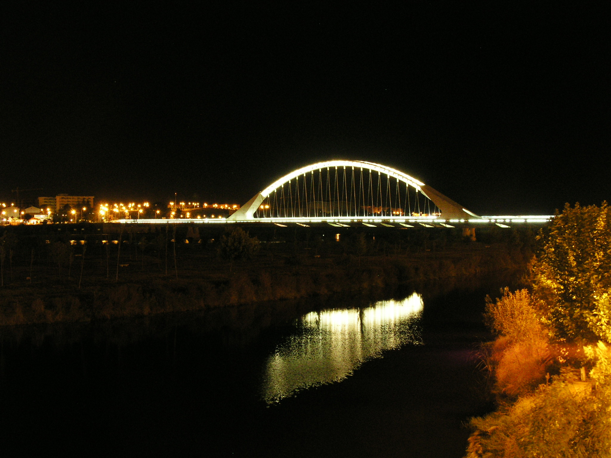 Mérida, Spain, Lusitania bridge, Calatrava